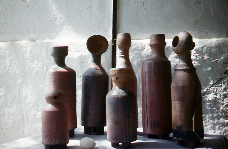 Ceramic